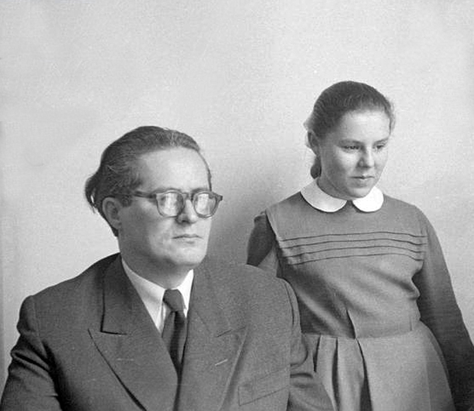 Ludwik Stefański with his daughter Elżbieta Stefańska (Kraków)